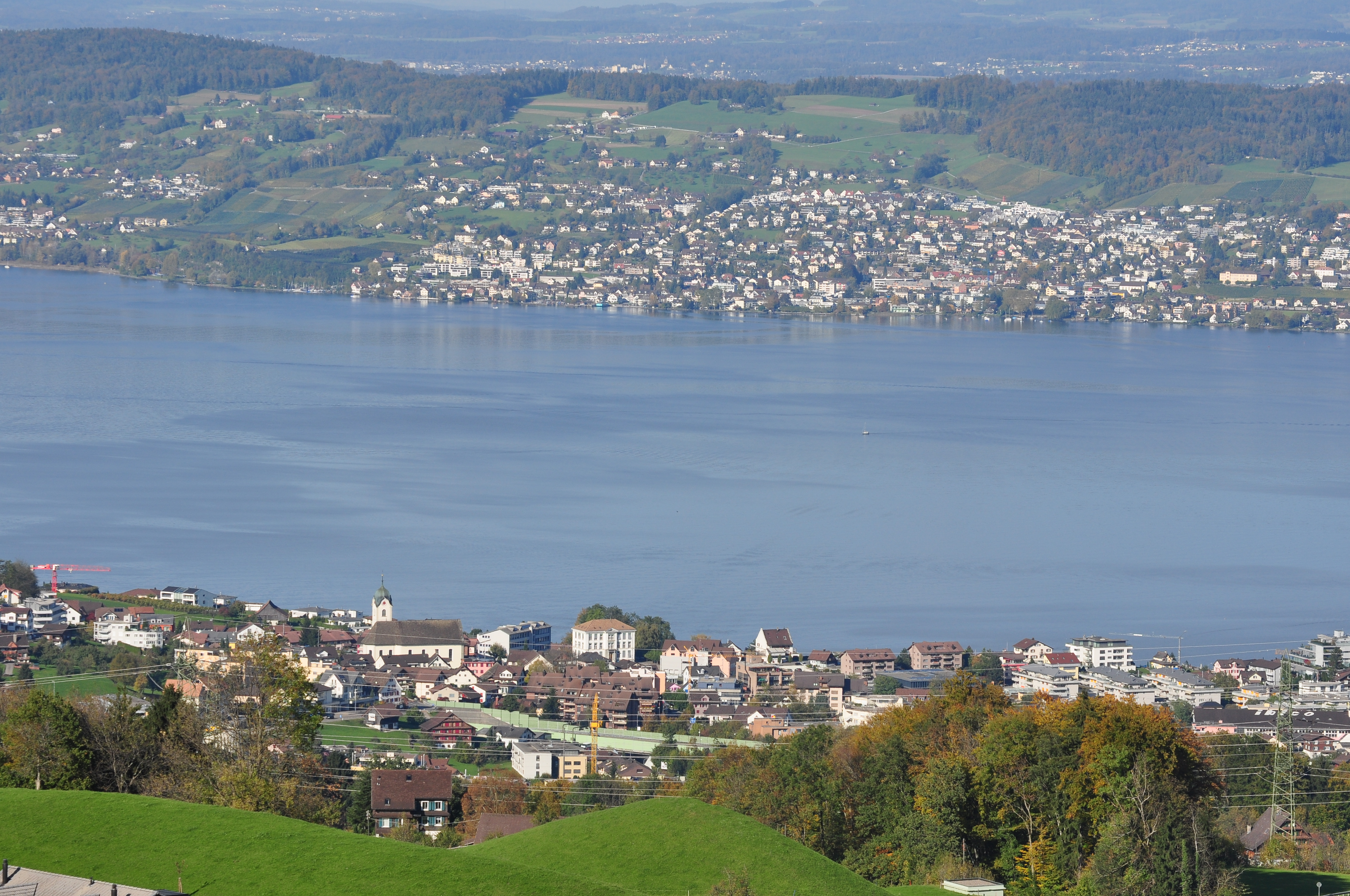 Stäfa, Zürichsee and Wollerau as seen from Feusisberg (Switzerland) towards Etzel mountain.